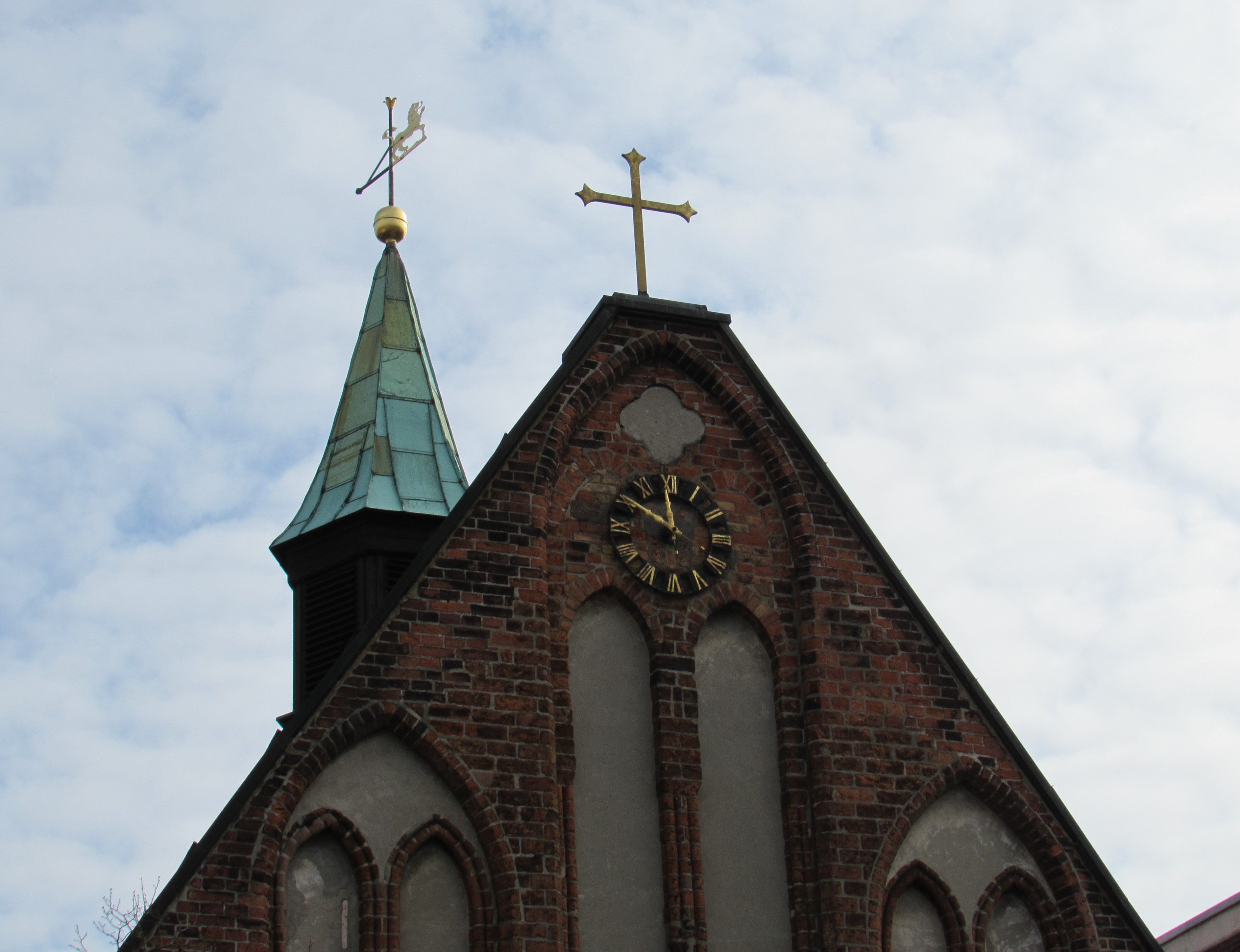 Der Giebel der Heiligen-Geist-Kapelle (Uelzen)